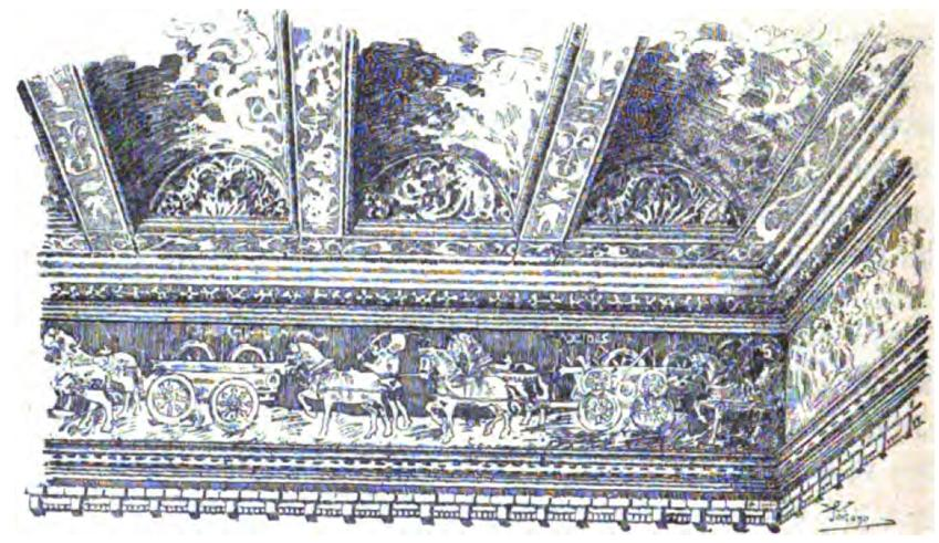 Fris i sostre del Palau comtal. Dins del llibre de Llorente, s'expliquen les figures del fris així: "Los rótulos de este friso explican del siguiente modo las figuras pintadas en él: «Acó es exer. —Açó es los cascadors para fer camí. —Gentdarmes. —Gentdarmes. —Archés. —Capitans de la vanguardia. —Patges. —Açó les piques. —Açó son banderes de la gent de peu. —Alabardes. —Espingardes. —Açó son ballestes. —Los carruatges. —Açó es falconet. —Açó la artillería. —Açó el canó gros de bombardes. —Açó es munició descales é rodes pera la guerra. —Açó es munició de pólvora é de pedres.»"